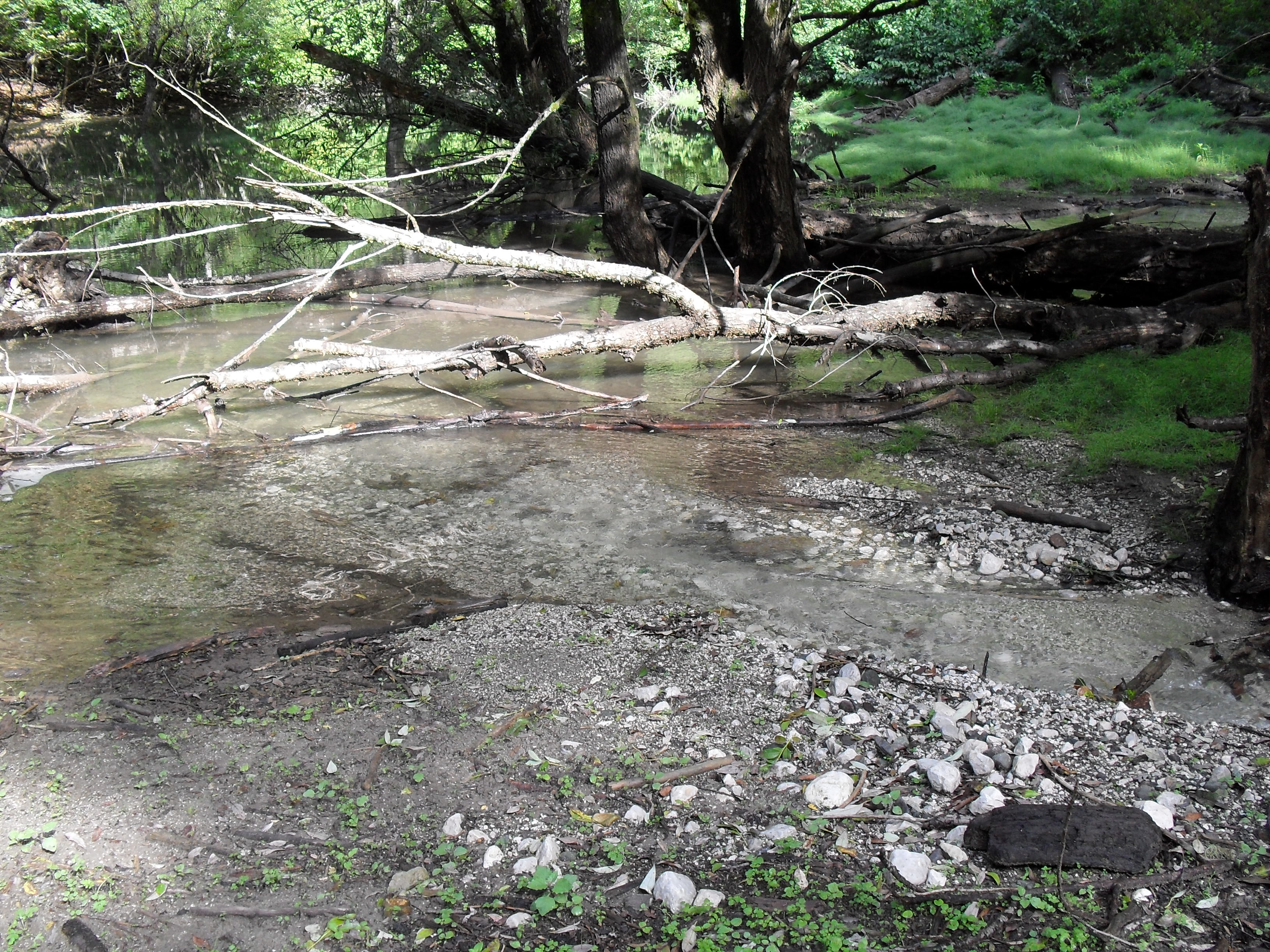 Абхазия. Ручей в карстовой котловине у оз.Рица